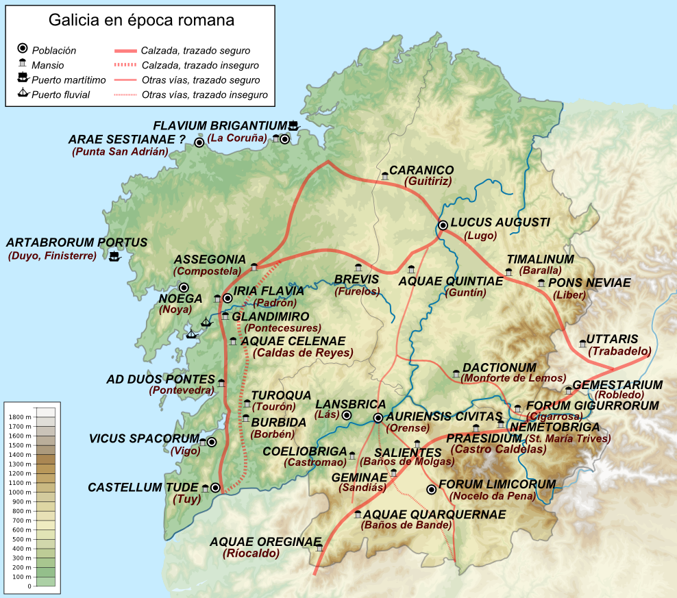 Mapa de la actual Galicia durante época romana. Para el trazado de las vías, la localización de las poblaciones y su equivalencia con las actuales, el mapa sigue lo indicado en la obra Tabula Imperii Romani, hoja K-29: Porto, editada en 1991 por el Instituto Geográfico Nacional de España. ISBN: 84-7819-034-1. También tiene en cuenta lo considerado en lo expuesto en Ermelindo Portela Silva (editor) "Historia de la ciudad de Santiago de Compostela", 2003, páginas 35 a 37. Las equivalencias entre poblaciones romanas y lugares actuales son las siguientes: Ad Duos Pontes: Pontevedra. Aquae Celenae: Caldas de Reyes (Pontevedra). Aquae Oreginae: Ríocaldo, Lovios (Orense). Aquae Quarquernae: Baños de Bande, Bande (Orense). Aquae Quintiae: Guntín (Lugo). Arae Sestianae : Punta de San Adrián, Malpica de Bergantiños (La Coruña). Artabrorum Portus: Duyo, junto a Finisterre. Assegonia: Santiago de Compostela. Aurensis Civitas: Orense. Brevis: Furelos, Melide (La Coruña). Burbida: Bordén, Pazos de Bordén (Pontevedra). Caranico: Guitiriz (Lugo). Castellum Tude: Tuy (Pontevedra). Coeliobriga: Castromao, Celanova (Orense). Dactionum: Monforte de Lemos (Lugo). Flavium Brigantium: La Coruña. Forum Gigurrorum: Cigarrosa, A. Rua (Orense). Forum Limicorum: Nocelo Da Pena, Sarreaus (Orense). Gemestarium: Robledo, Rubiana (Orense). Geminae: Sandiás (Orense). Glandimiro: Pontecesures (La Coruña). Iria Flavia: Padrón (Pontevedra). Lansbrica: Lás, San Amaro (Orense). Lucus Augusti: Lugo. Nemetobriga: Santa María de Trives, Puebla de Trives (Orense). Noega: Noya (La Coruña). Pons Neviae: Liber, Becerreá (Lugo). Praesidium: Burgo, O. Castro Caldelas (Orense). Salientes: Baños de Molgas (Orense). Timalinum: Baralla (Lugo). Turoqua: Tourón, Pontecaldelas (Pontevedra). Uttaris: Trabadelo (León). Vicus Spacorum: Vigo. Para la realización del mapa se ha utilizado como base: .